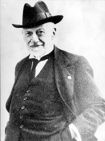 Ritratto di Attilio Odero